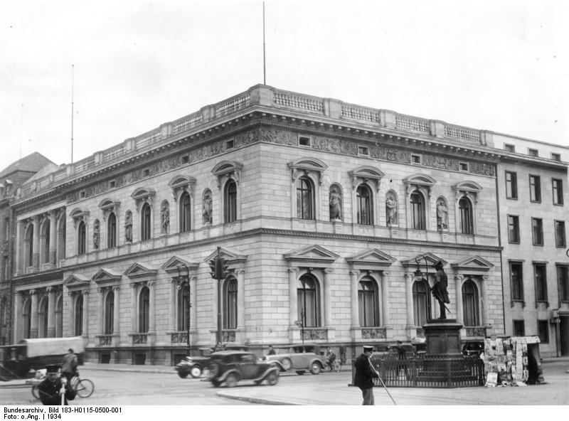 ADN-Zentralbild / Archiv Berlin 1934 Das Palais Voß in der Voß-Straße Ecke Wilhelmstraße, vom Wilhelmplatz gesehen; rechts anschließend die Reichskanzlei. Im Palais Voß soll die Präsidialkanzlei untergebracht werden. 39869-34 Information added by Wikimedia users. Korrektur: Es handelt sich um das Palais Borsig, nicht um das Palais Voß. Letzteres, auch bekannt als Palais Marschall, war für die Anlage der Voßstraße (im Foto links) bereits 1872 abgerissen worden. Voßstraße und alle Bauten an ihr, einschließlich des Palais Borsig, entstanden auf dem riesigen ehemaligen Voß-Grundstück. Das Palais Borsig wurde 1938 in den Gebäudetrakt zwischen Alter und Neuer Reichskanzlei eingegliedert, am Ende des Krieges schwer beschädigt und mit den anderen Reichskanzlei-Bauten nach Kriegsende abgerissen.